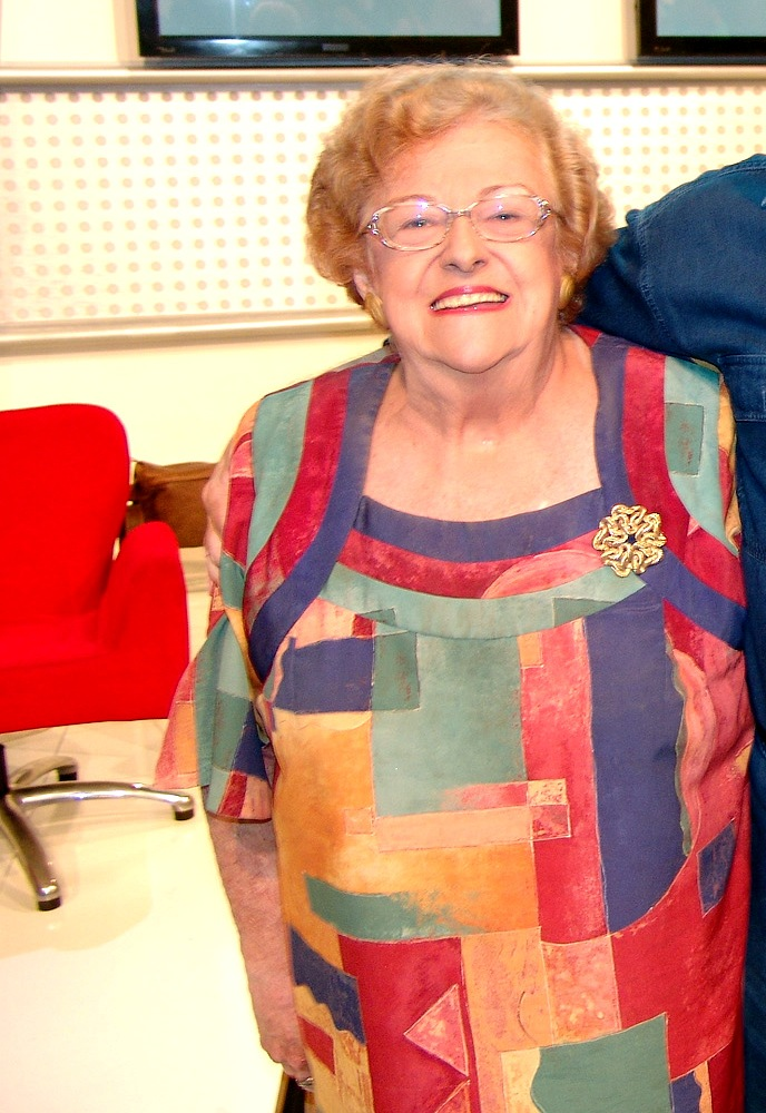 A consagrada atriz Etty Fraser